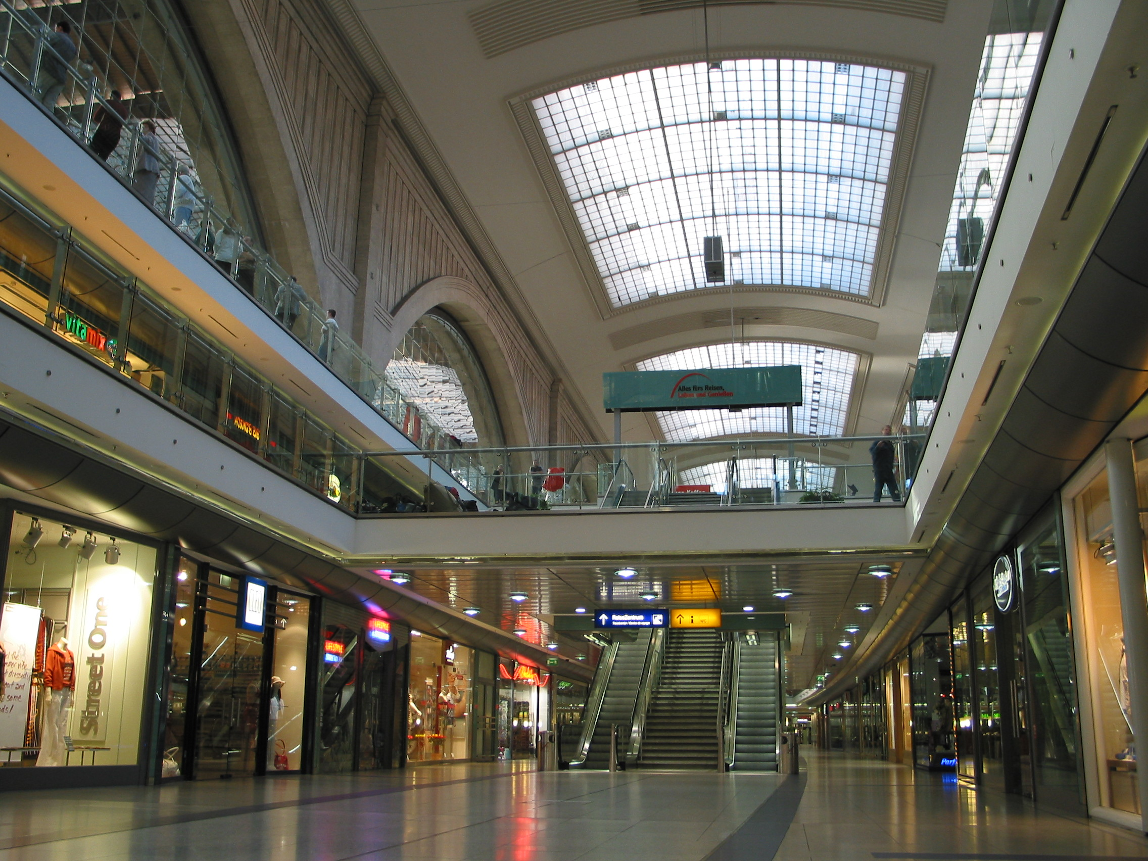 Die 270 m lange, 33 m breite und 27 m hohe Querhalle des Hauptbahnhofs, welche von einer gläsernen Flachtonne überspannt wird.